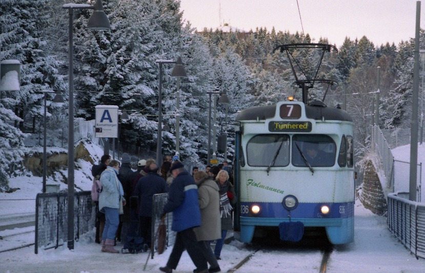 Spårvagnar typ M29 (836)-851 på linje 7 vid Komettorget i Bergsjön, Göteborg